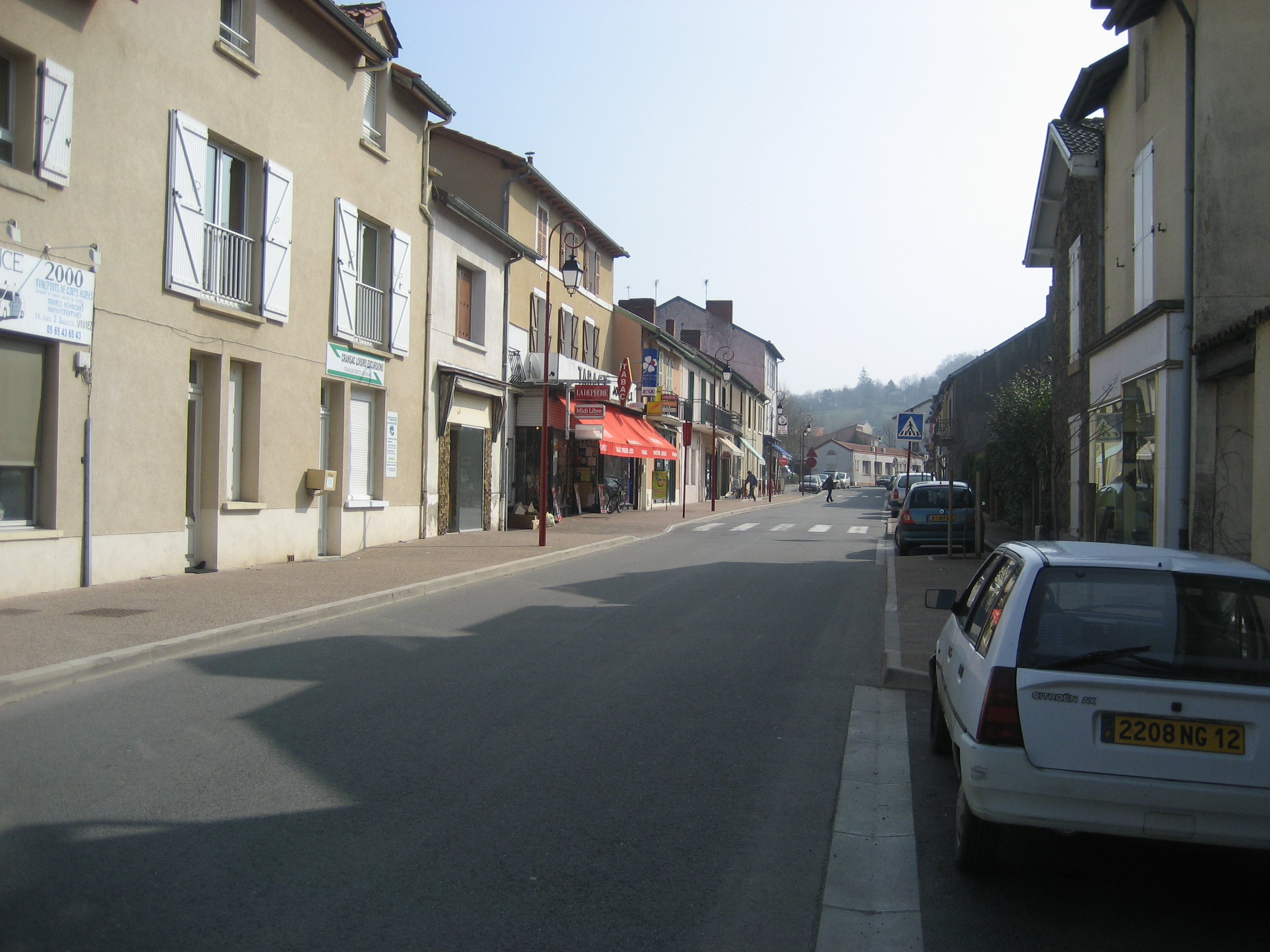 Une rue de Cransac